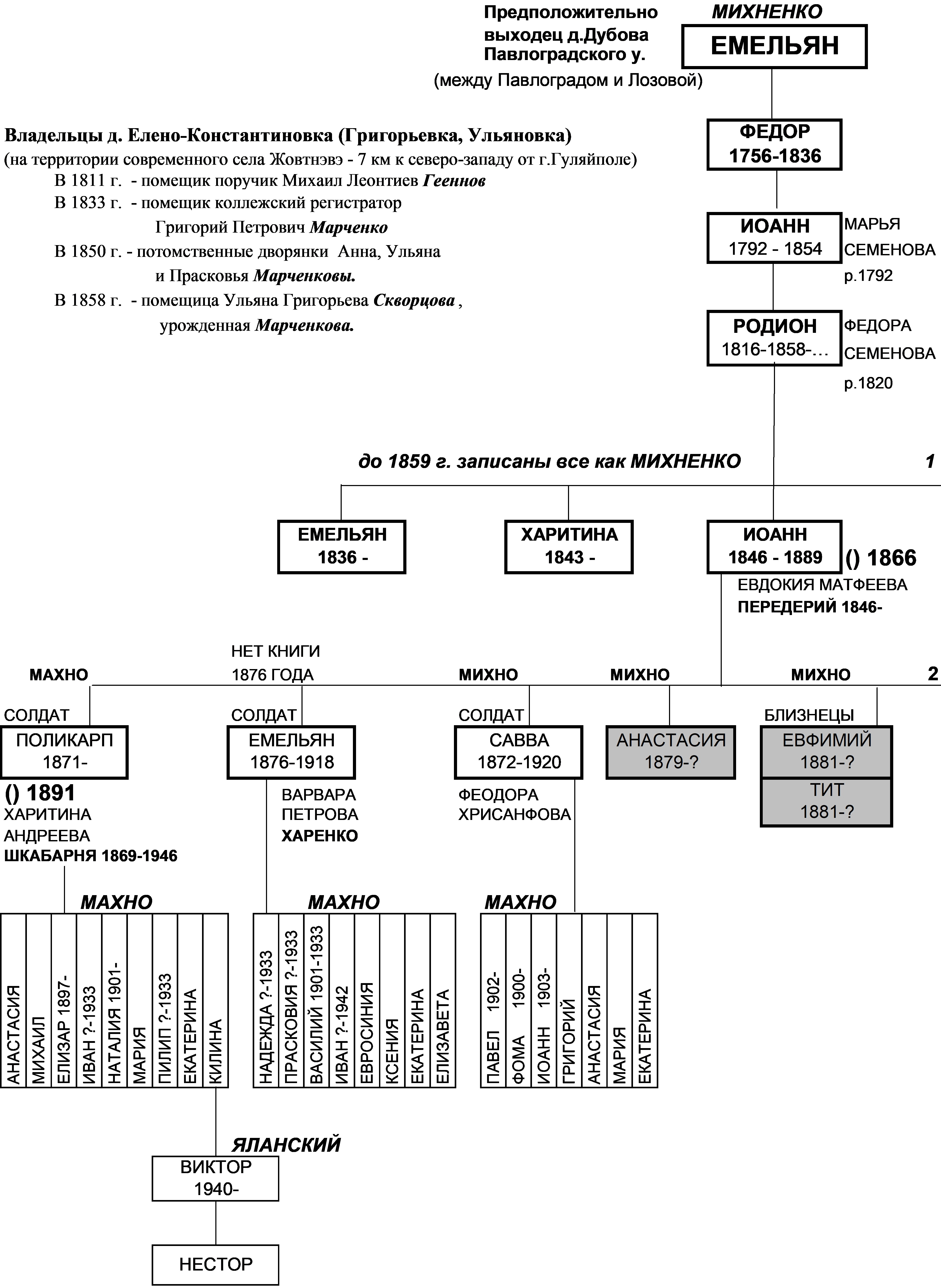 Перший родовід Михненків - потомків Нестора Махна за період з ХVIII по ХХ сторіччя.